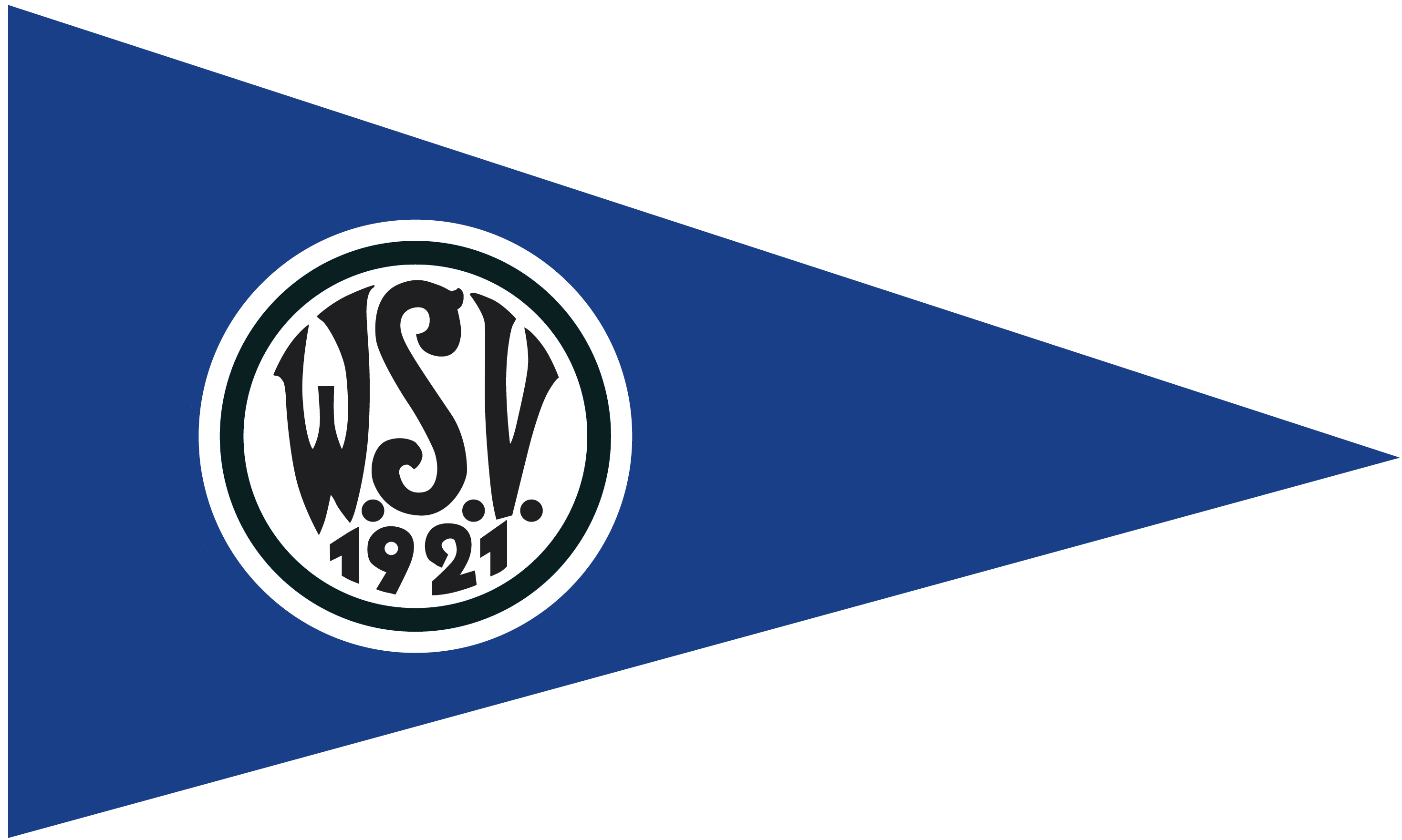 Stander des WSV 1921